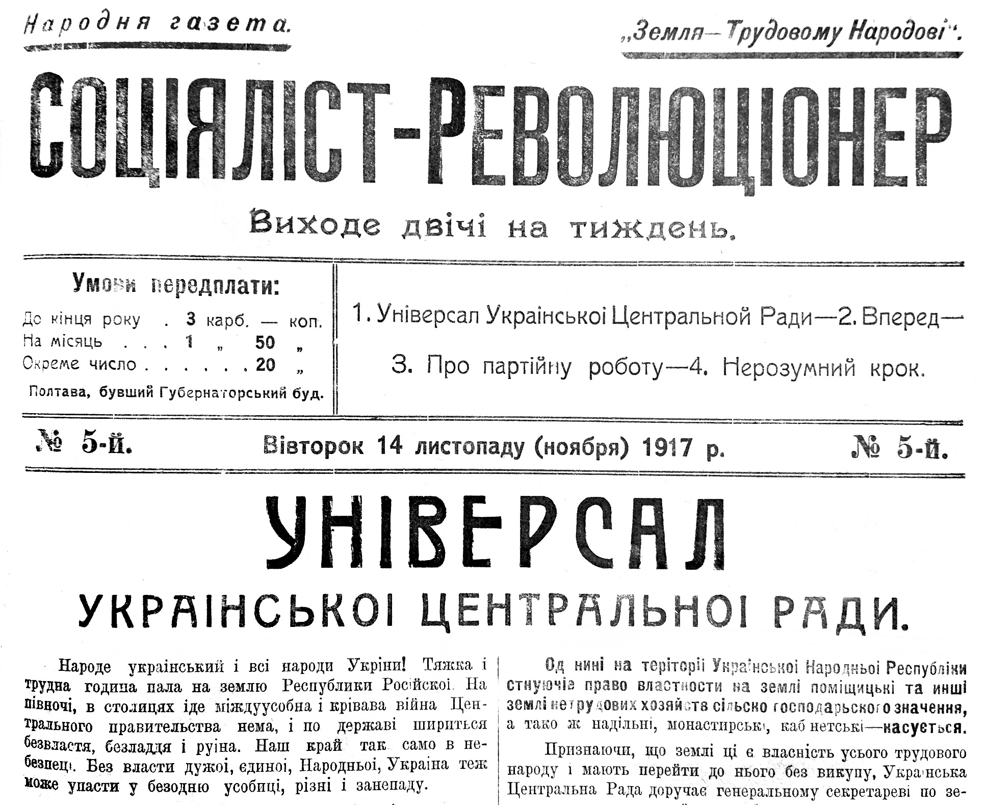 Соціаліст-Революціонер : народня газета / видавець А. Генс; головні редактори А. Генс, А. Заливчий. — Полтава, 1917.